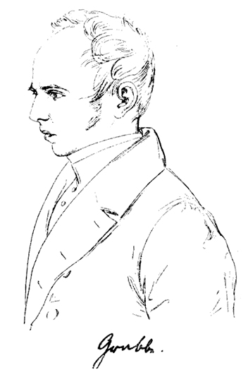 Zeichnung von Christian Dietrich Grabbe